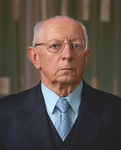 Dzierżymir Jankowski, profesor nauk humanistycznych